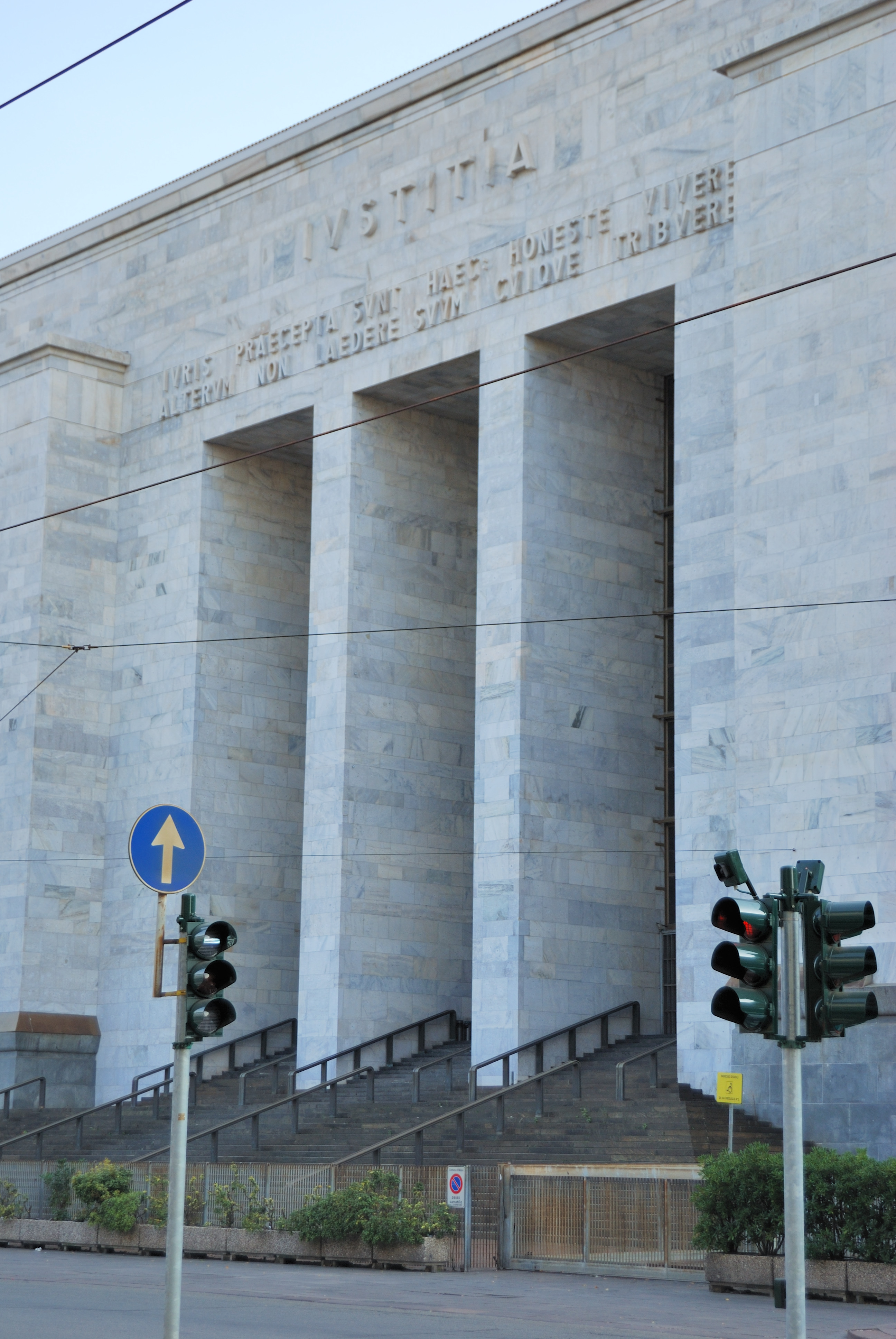 Palazzo di Giustizia, Milano. Ottobre 2009